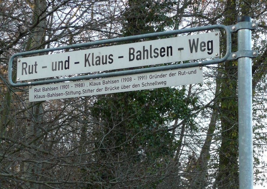 Schild Rut Klaus Bahlsen Weg